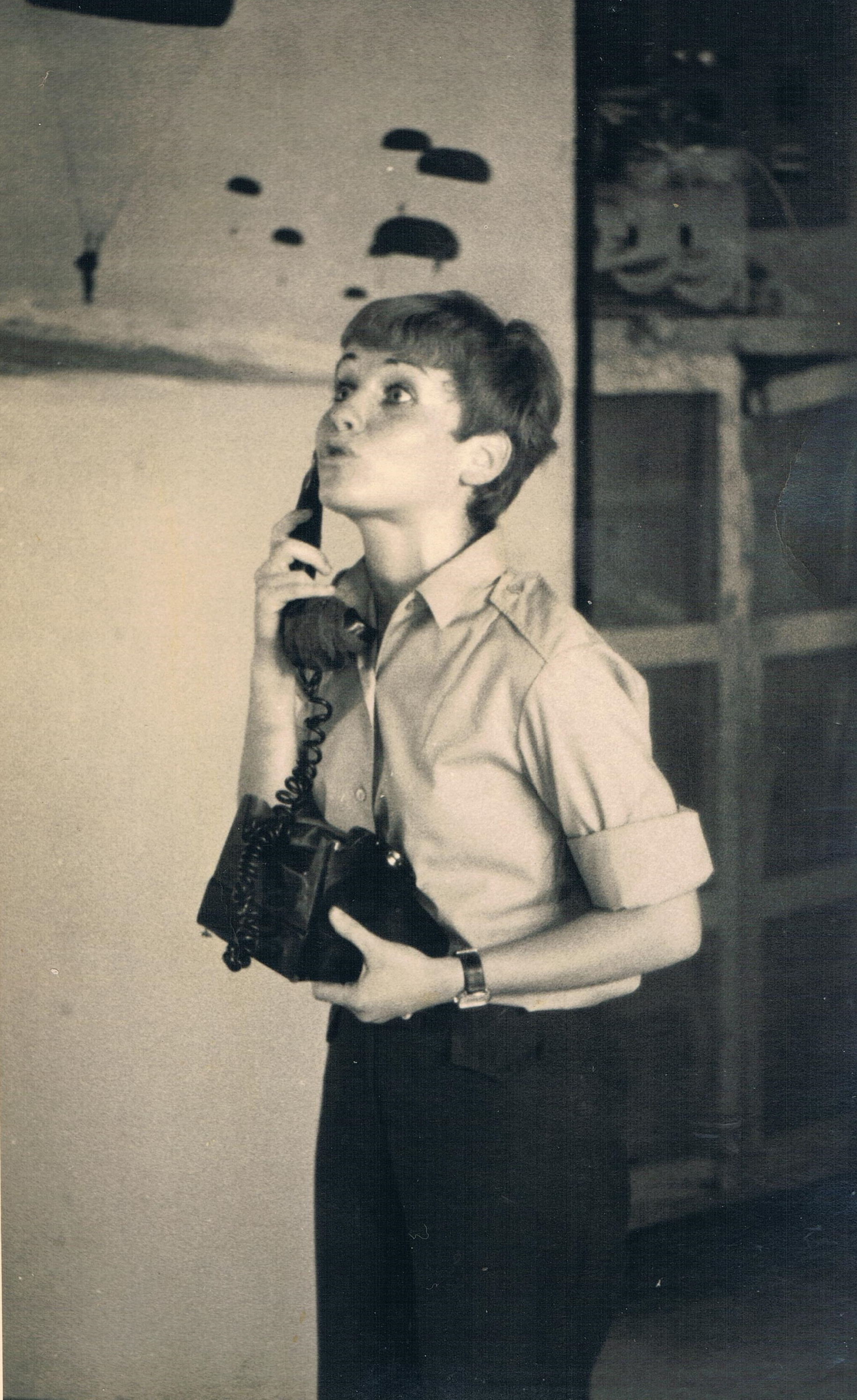 גליה ישי במערכון "הלו חטיבה 7" במסגרת התכנית "רד אלינו לבקעה", להקת פיקוד המרכז